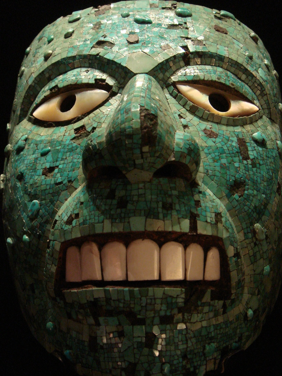 Mask (human face, possibly representing Xiuhtecuhtli). Máscara de Xiuhtecuhtli. Mosaico de turquesa y otros materiales. Cultura Mixteca-Azteca, 1400-1521 d. C. Representación de Xiuhtecuhtli (dios del fuego de México central también llamado Señor Turquesa). British Museum, London Ethno. St.400